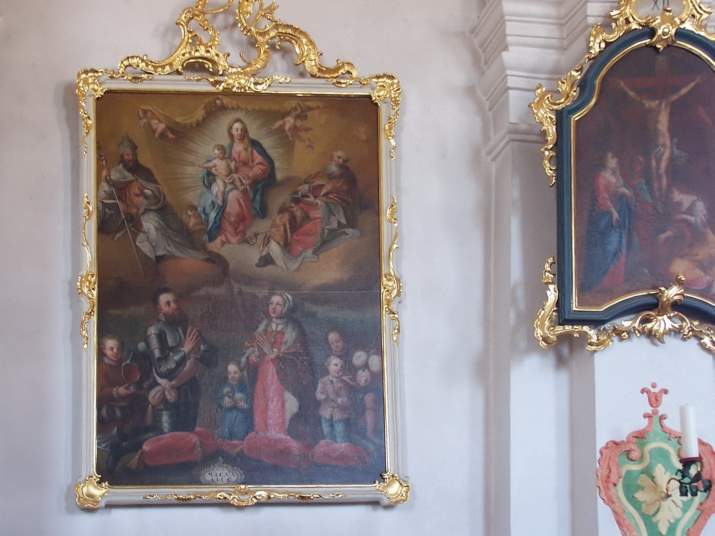 Sandsbach, Am Kirchberg 3; Am Kirchberg 2. Katholische Pfarrkirche St. Petrus. Das Votivgemälde im Rokokorahmen auf Leinwand aus dem Jahr 1770 zeigt die Muttergottes mit Heiligen über dem Kloster Geisenfeld und der Stifterfamilie der Ebersberger.